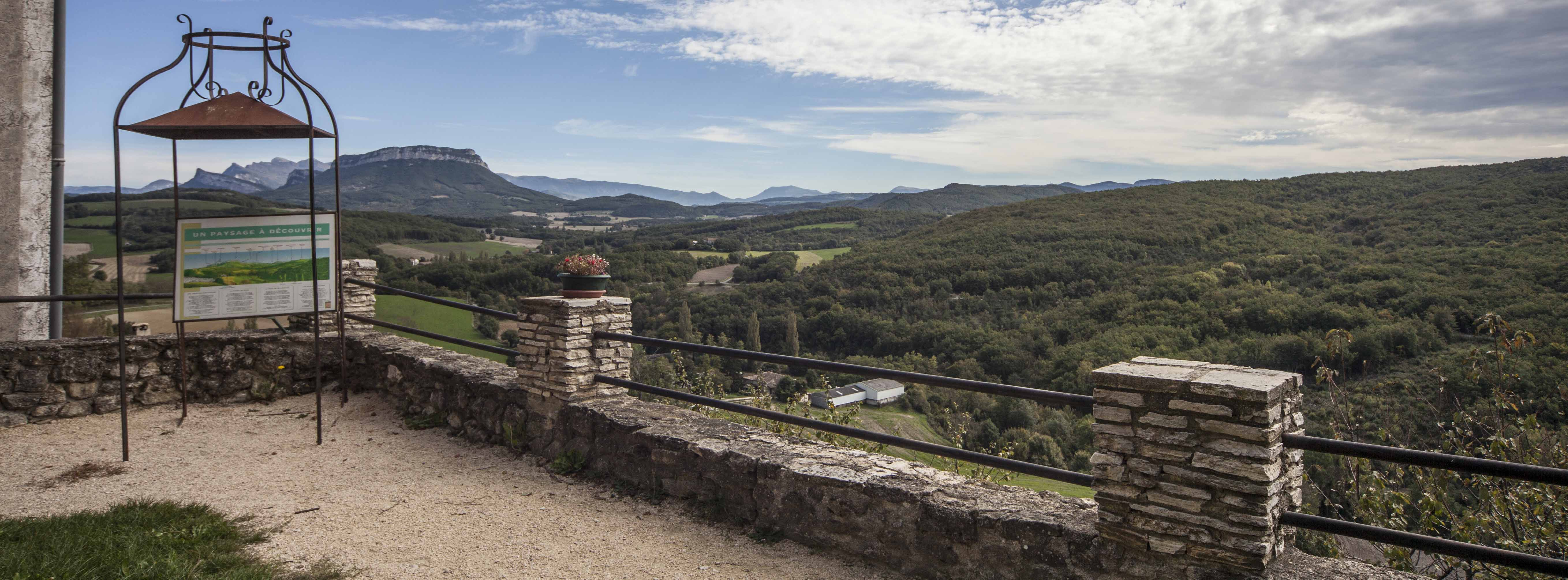 vue depuis la place du village en direction du massif de Saou